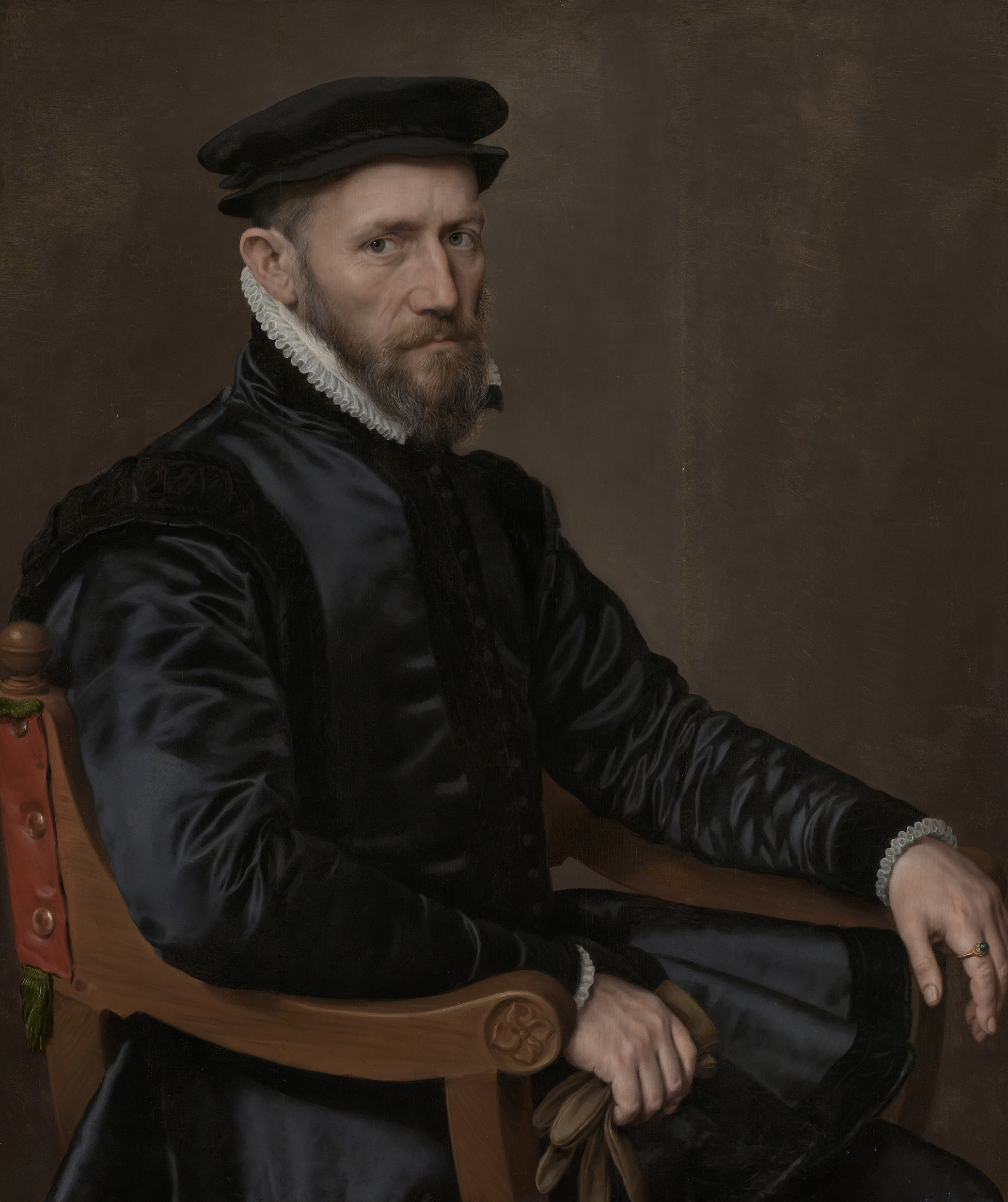 Portret van Sir Thomas Gresham. Koopman en financieel agent der Engelse kroon in de Nederlanden, stichter van de Londense beurs en van Gresham College te Londen. Zittend in een stoel, handschoenen in de rechterhand. Pendant van SK-A-3119.; Anthonis Mor (1519–ca. 1576/78), Antwerpen, ca. 1560–1565, olieverf op paneel